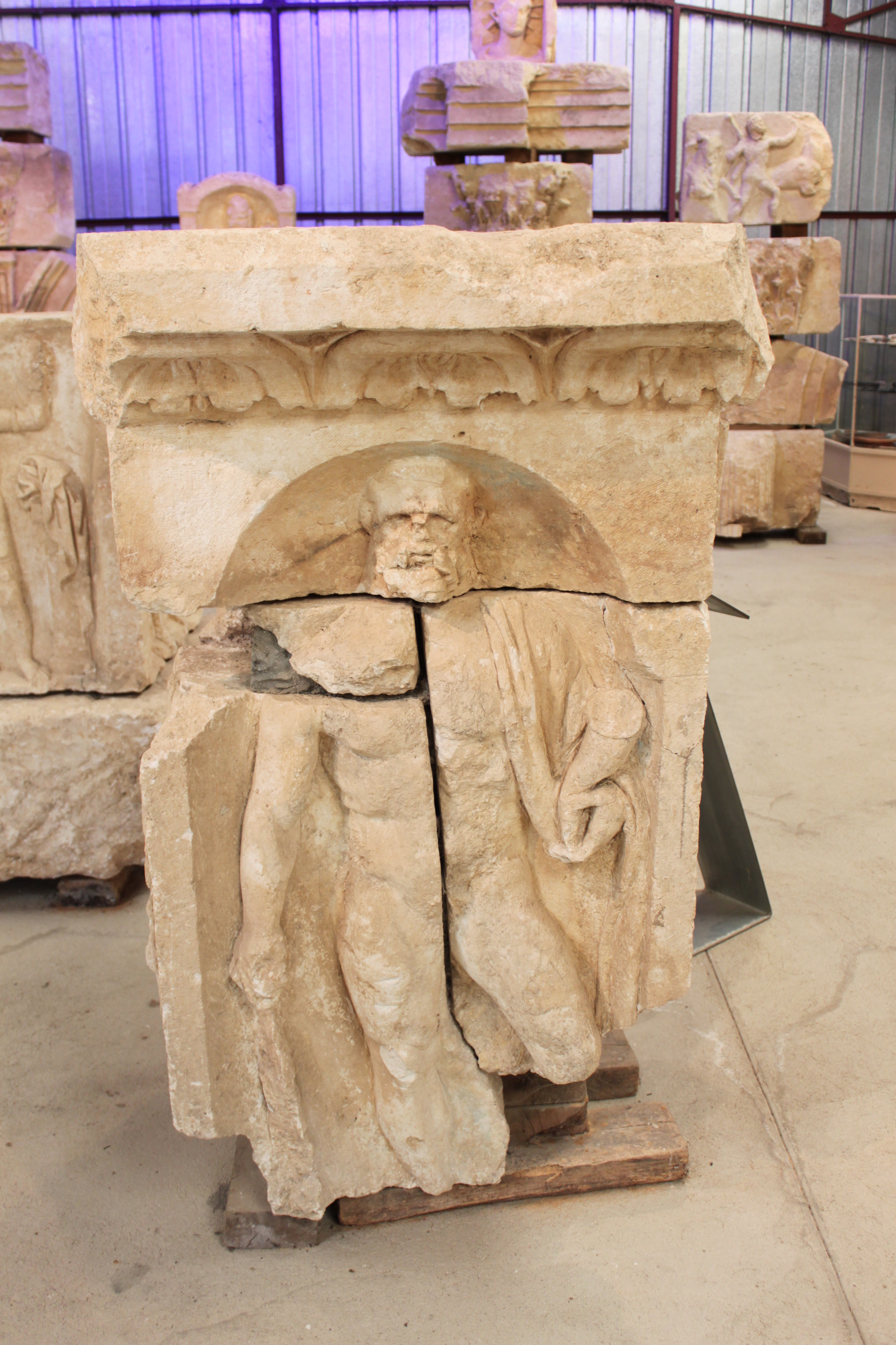 site gallo-romain et mérovingien d'Escolives-Sainte-Camille